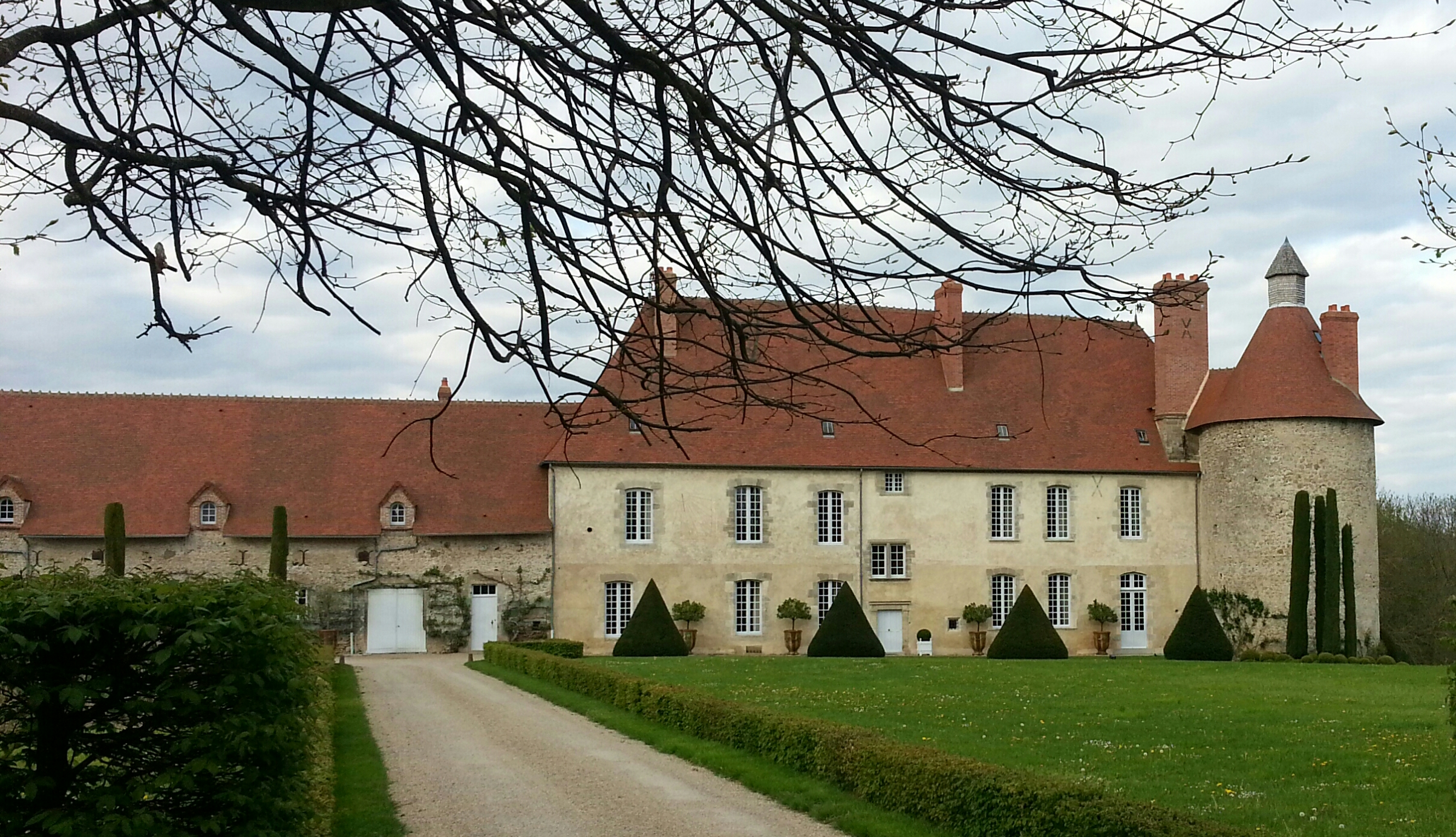 Château de Bompré à Barbusier, dans le département français de l'Allier